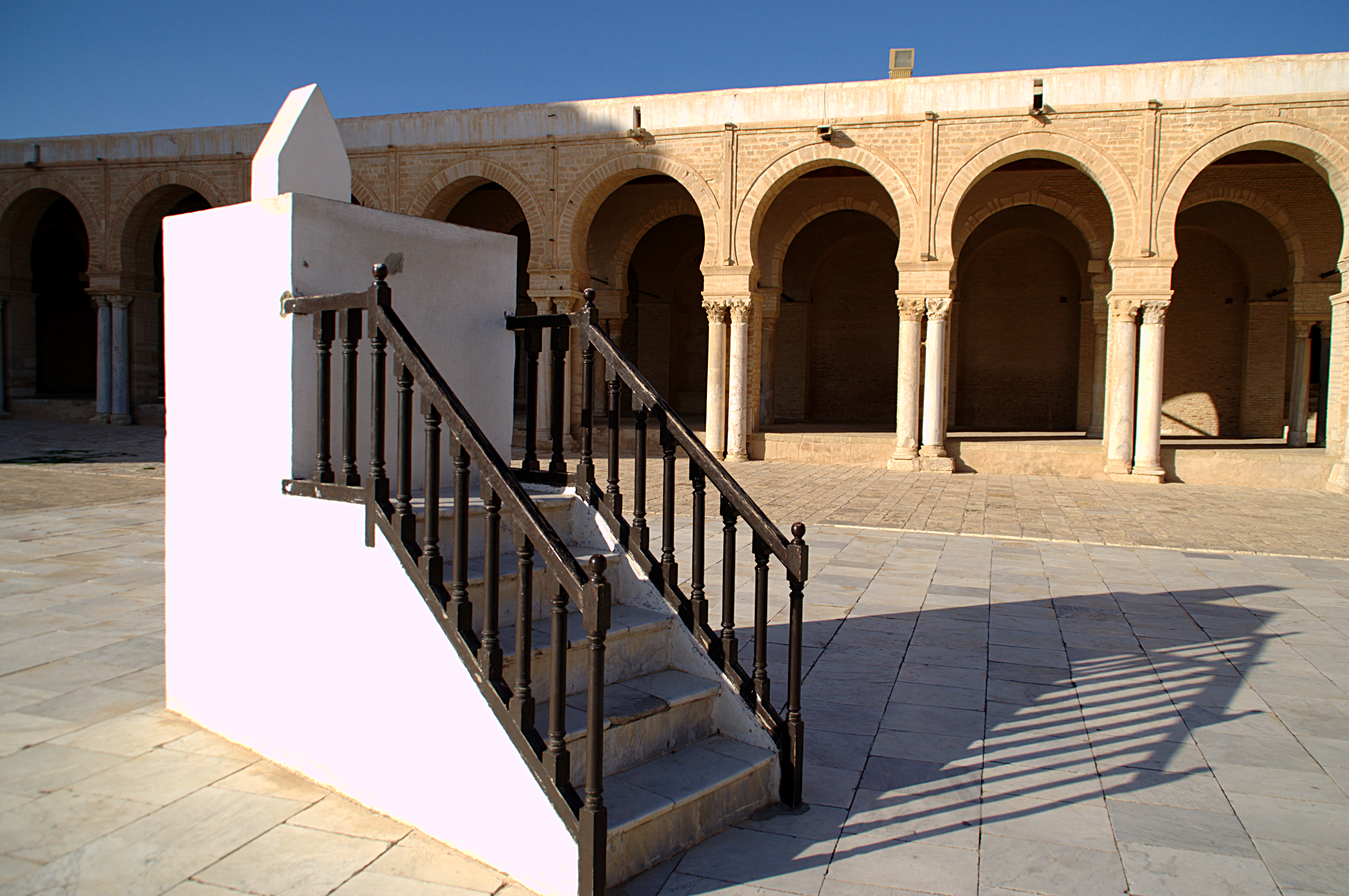 Grande Mosquée (Sidi Okba), Kairouan